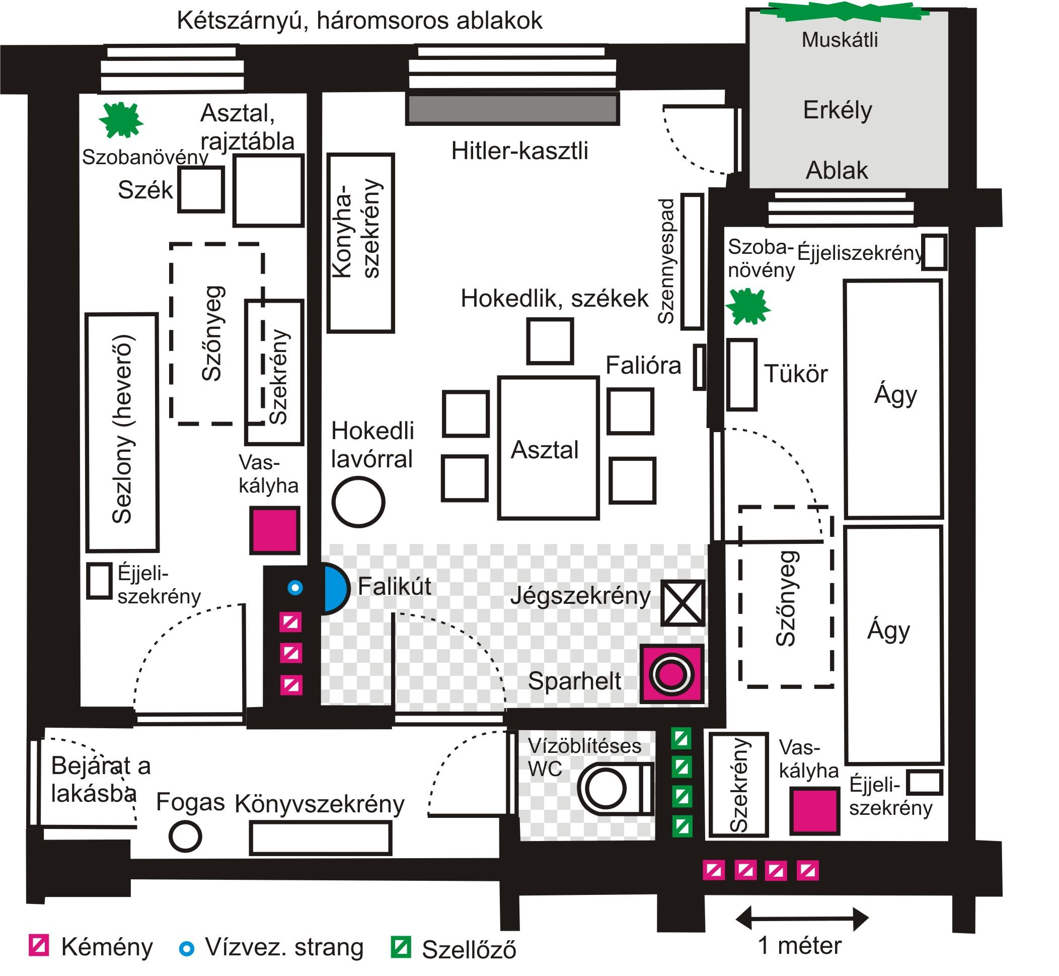 Pongráctelepi lakás alaprajz, 1940-es évek, visszaemlékezések és tervrajzok alapján.